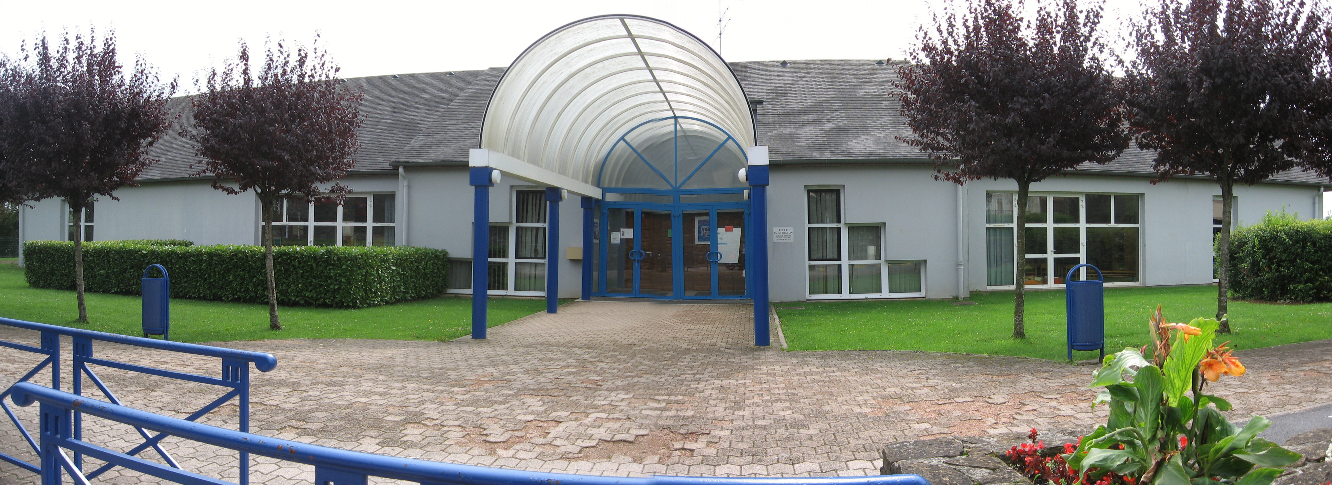 Ecole Henri Biston de Rimogne